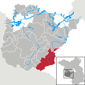 Treuenbrietzen in Brandenburg (Country) - District Potsdam-Mittelmark